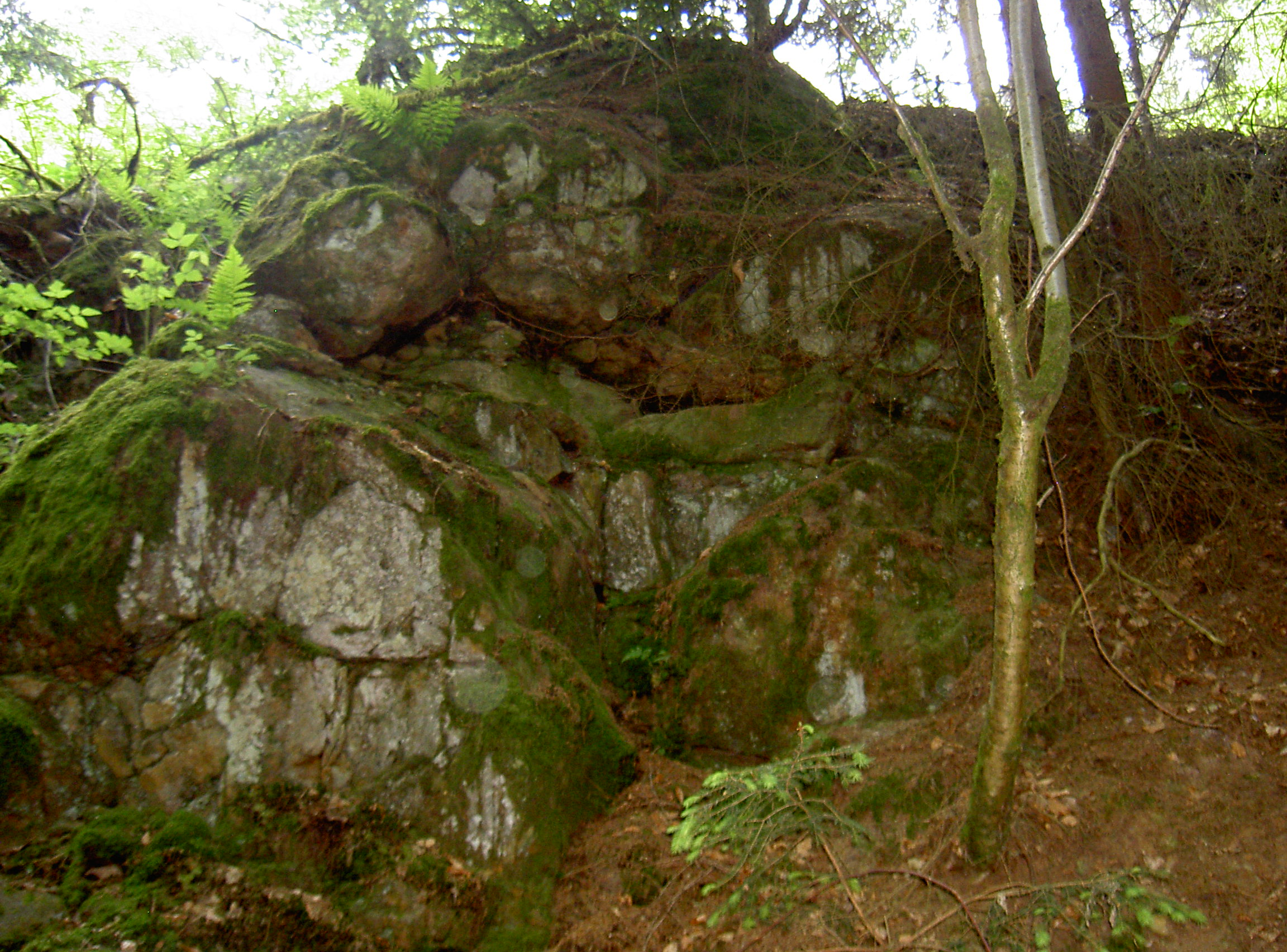 Geotop Ehemaliger Steinbruch an der Marienruh